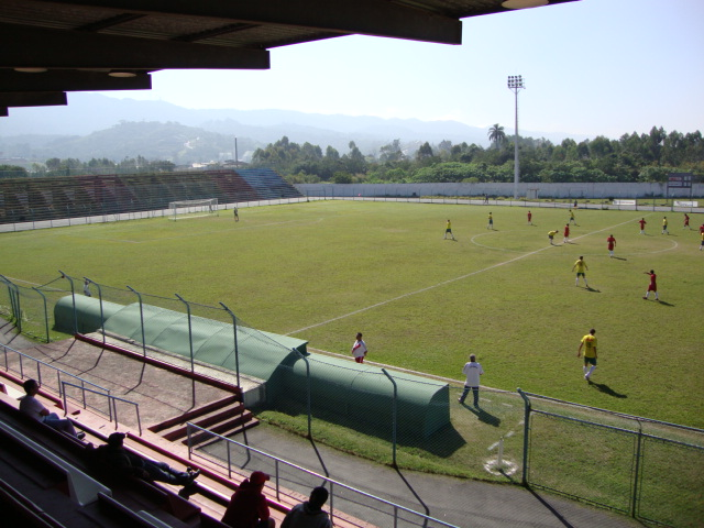 estádio Francisco Ribeiro Nogueira, localizado no município de Mogi das Cruzes, estado de São Paulo, Brasil